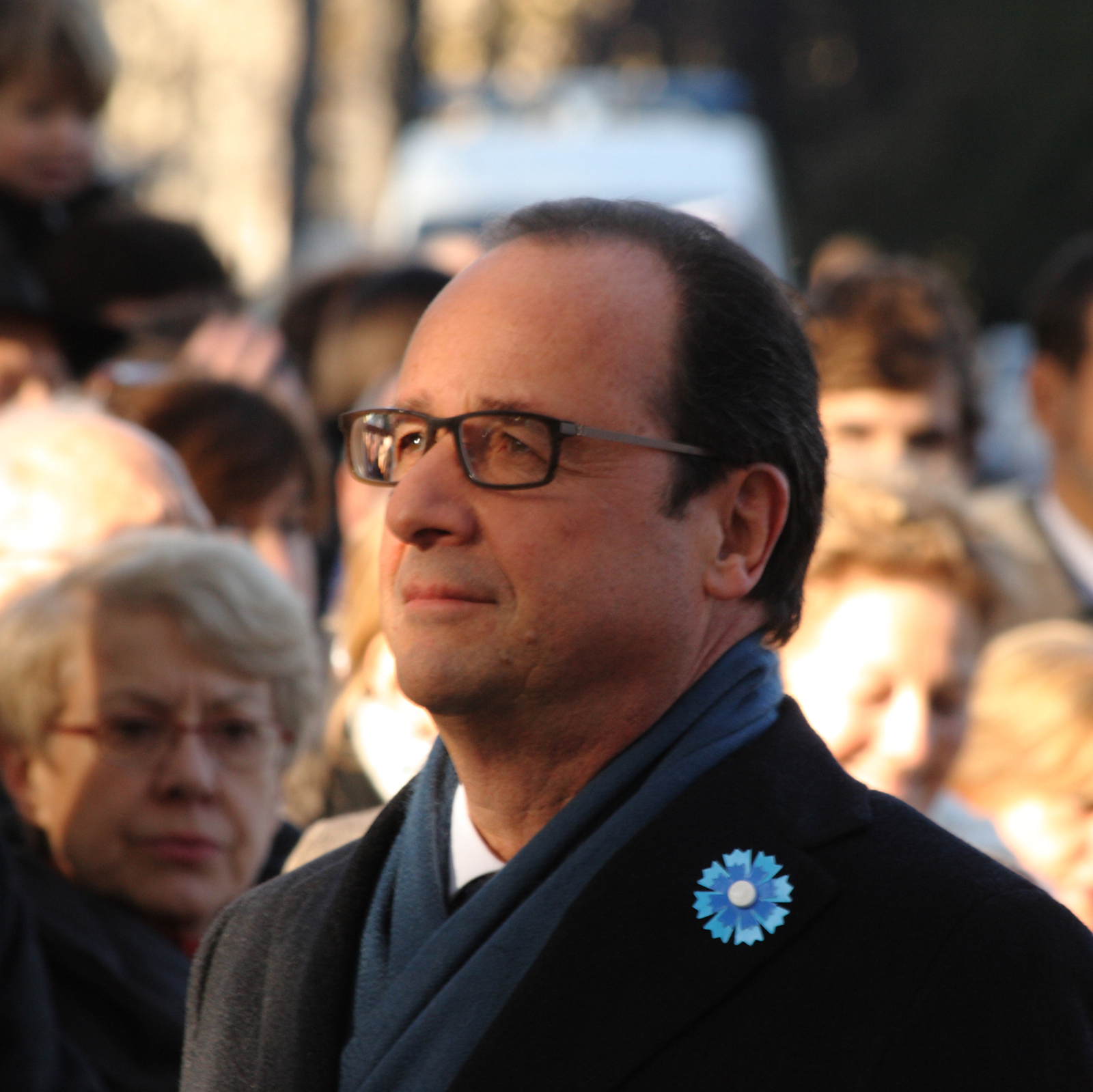 François Hollande, président de la République, aux cérémonies du 11 novembre